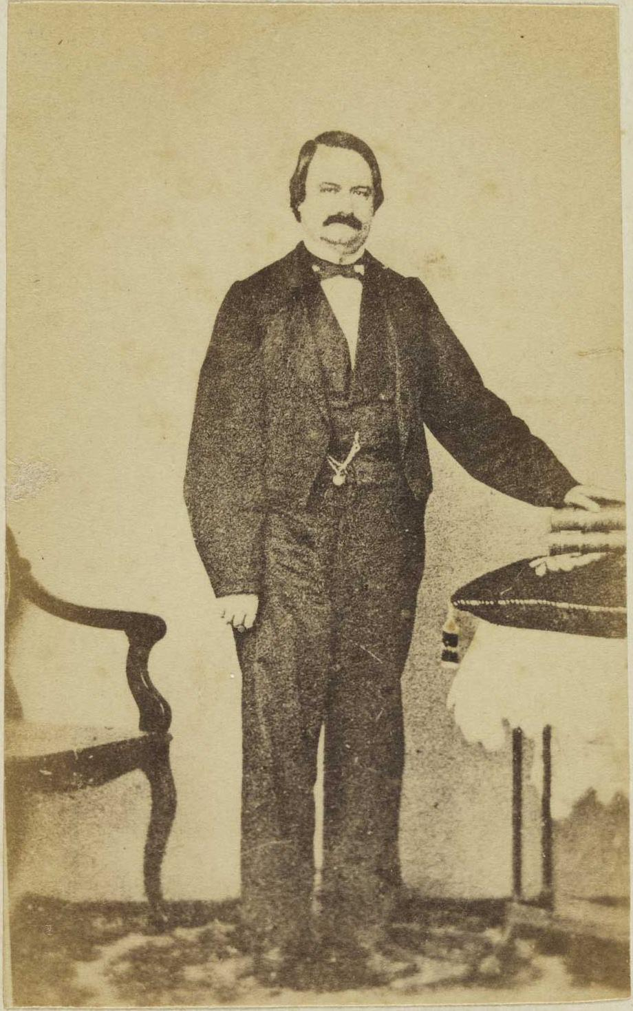 José Bergés